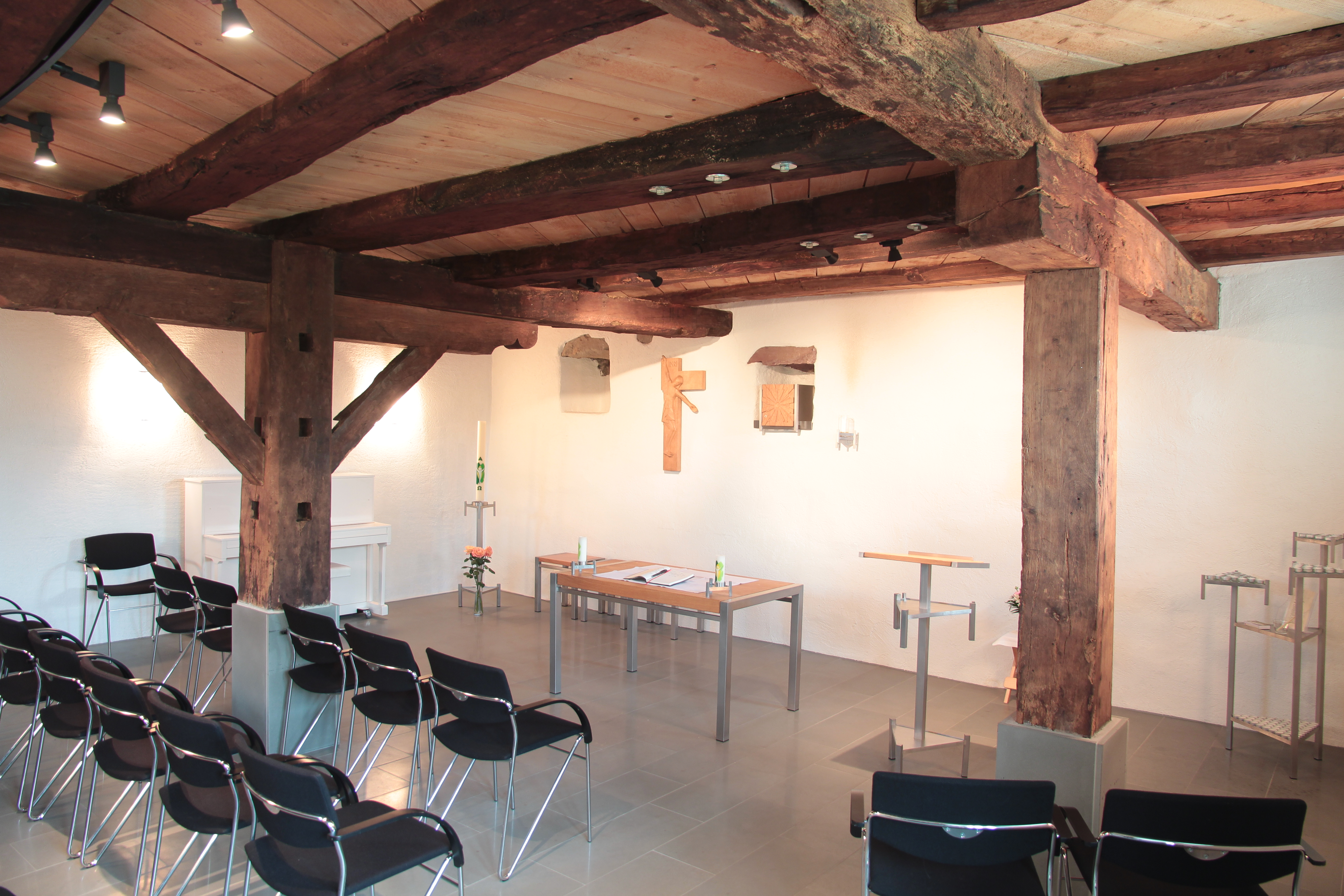 Römisch-katholisches Pfarreizentrum St. Gabriel im Haus zum Wiesenthal in Schwerzenbach, Kapelle St. Gabriel